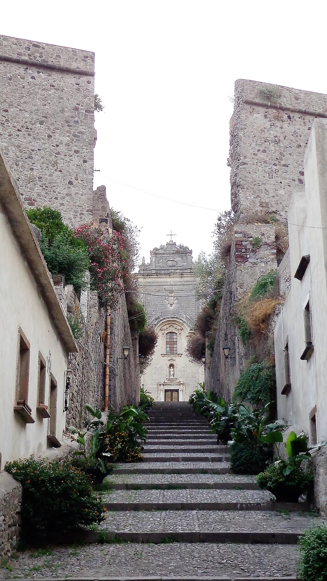 Via Concordato. Foto altresì presente siti personali e archivio FB.